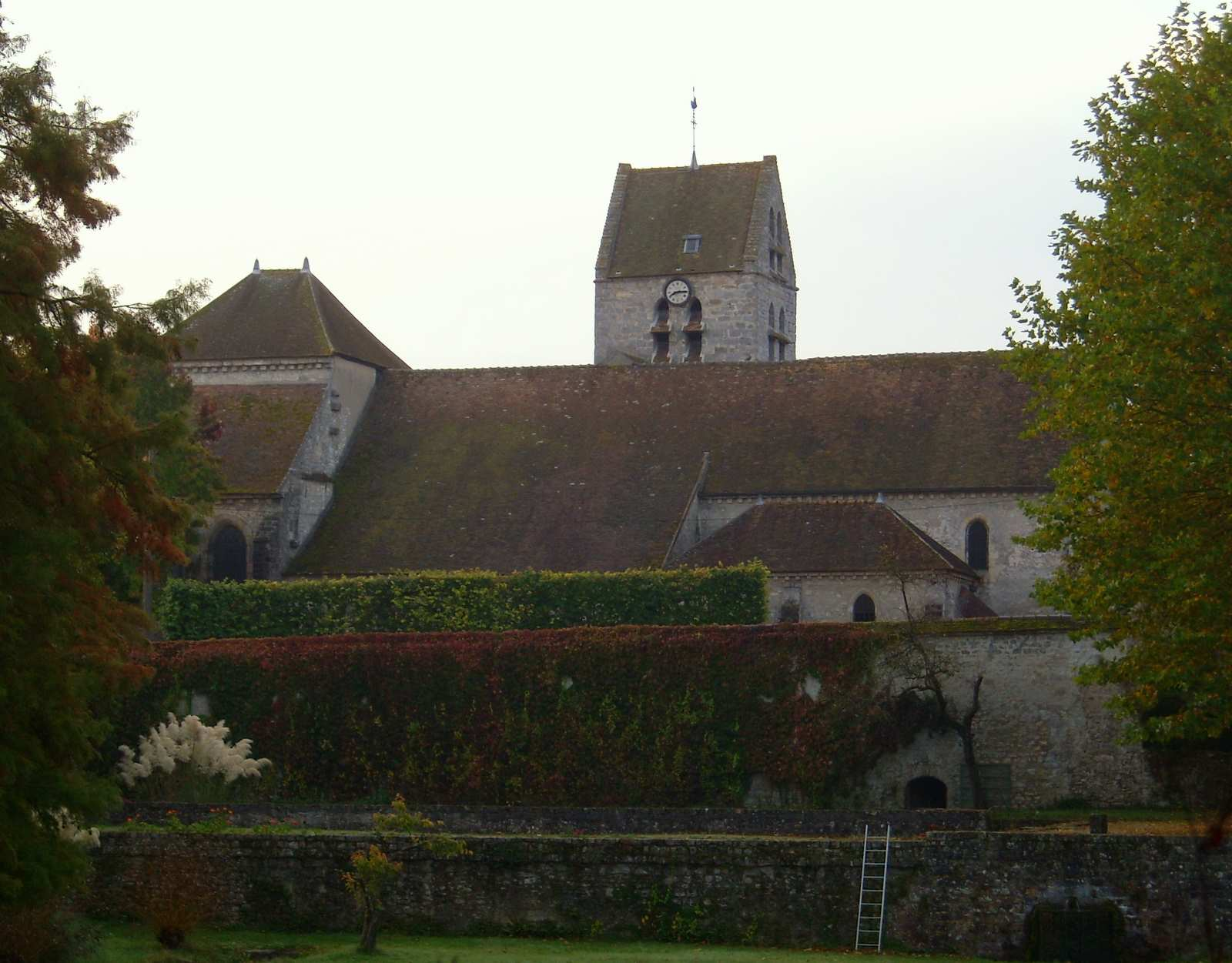 Eglise Saint-Pierre d'Avon